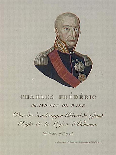 Karl Friedrich, Großherzog von Baden, geboren am 22. November 1728